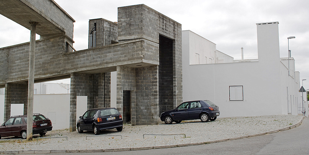 Bairro da Malagueira, Évora, Portugal